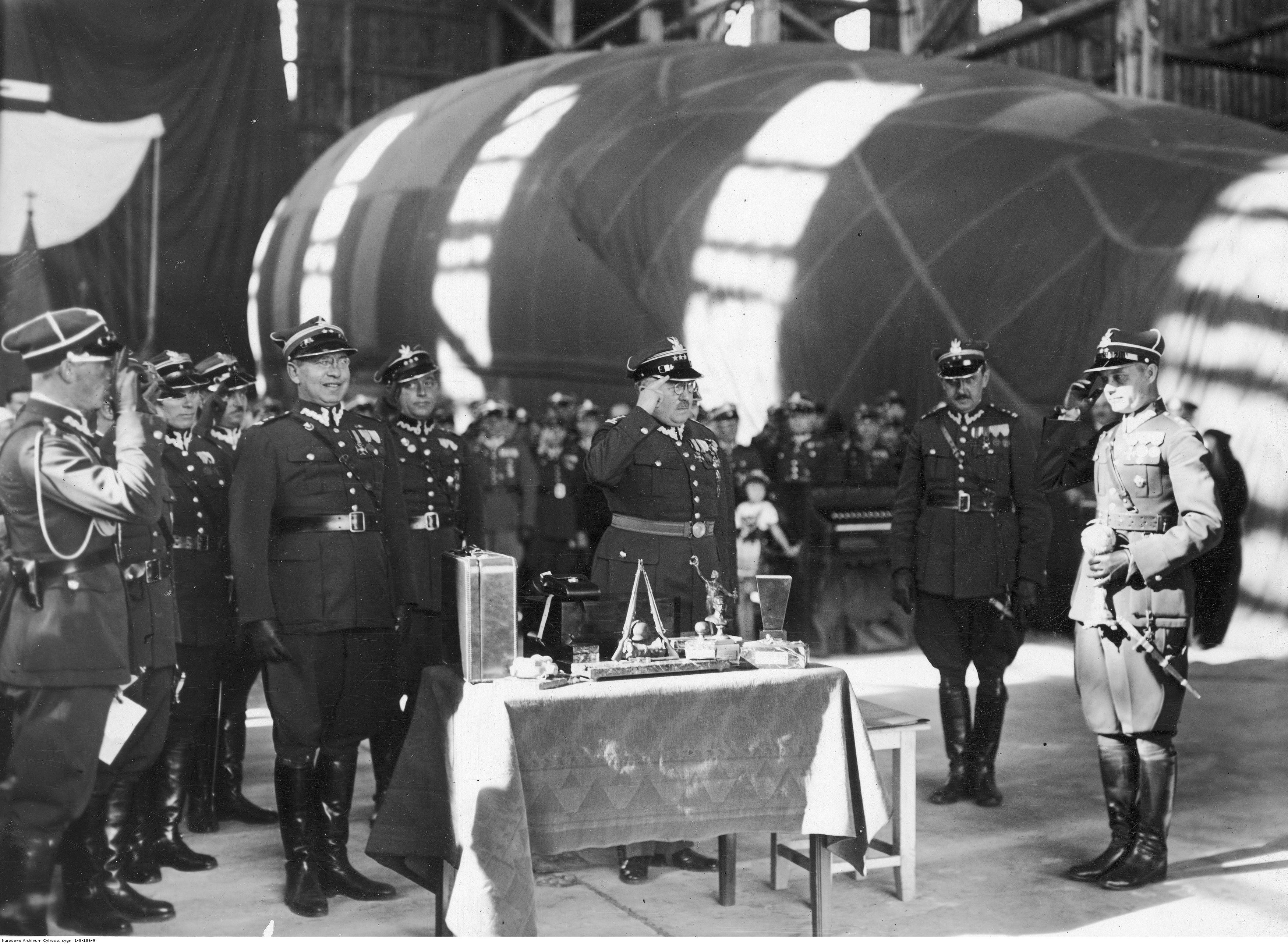 VI Krajowe Zawody Balonów Wolnych o Puchar im. pułkownika Aleksandra Wańkowicza w Legionowie. Uroczystość zakończenia zawodów; 28 września 1933. Widoczni m.in.: zwycięzca zawodów przedstawiciel Departamentu Aeronautyki Ministerstwa Spraw Wojskowych porucznik Jan Zakrzewski pilotujący balon Gniezno z pucharem (1. z prawej), fundator nagrody pułkownik Aleksander Wańkowicz (3. z prawej). Koncern Ilustrowany Kurier Codzienny - Archiwum Ilustracji. Sygnatura: 1-S-186-9